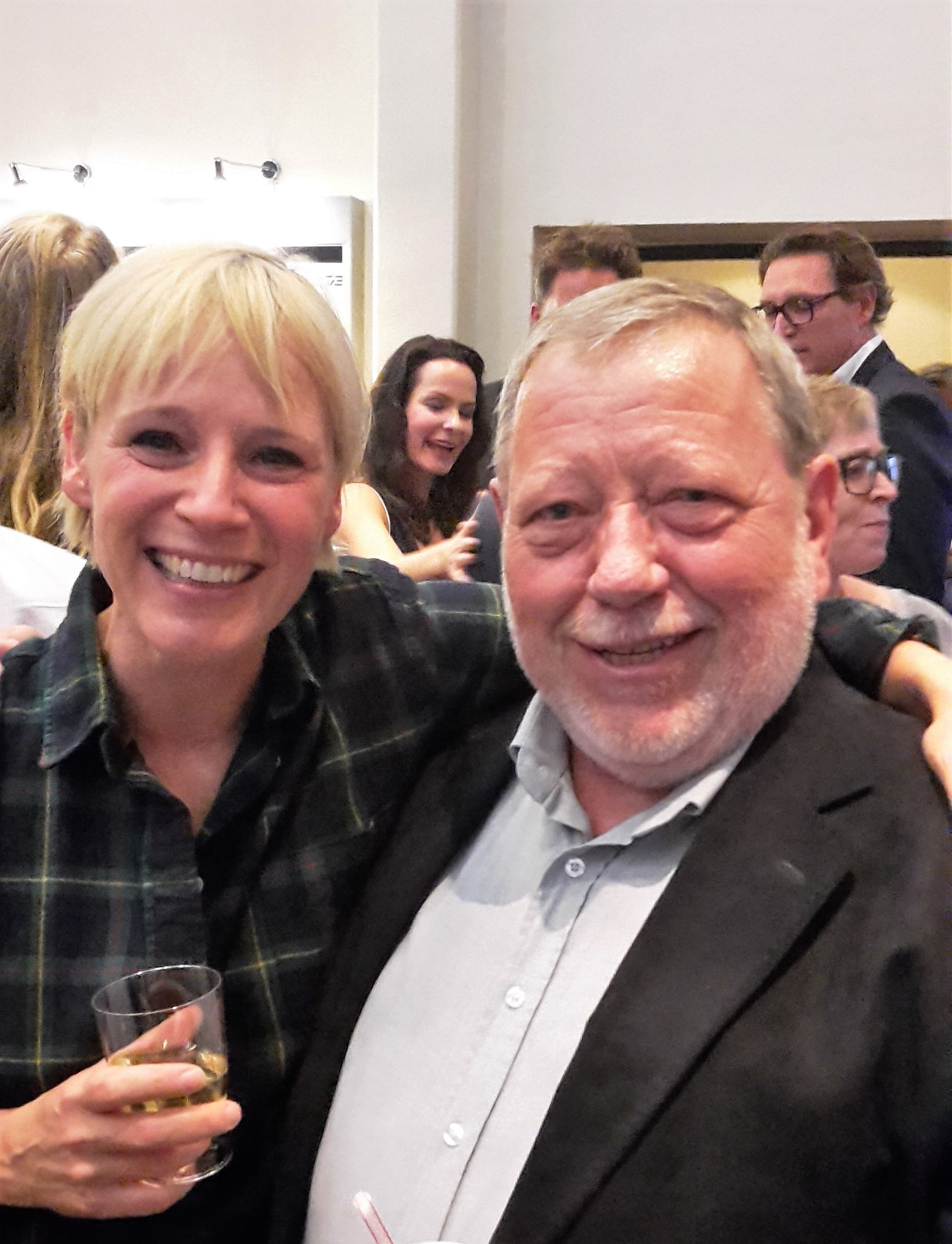 Iben Hjejle og Bjarne Krogh-Pedersen ved starten af 3. sæson af serien Dicte på TV2